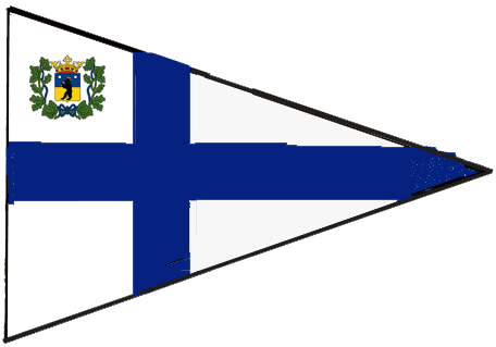 uhmaviiri routavuosilta